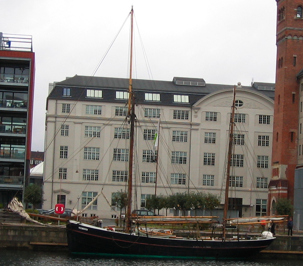 Anna Elise fra Københavns Havn